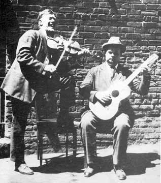 Gid Tanner und Riley Puckett spielen auf der Straße